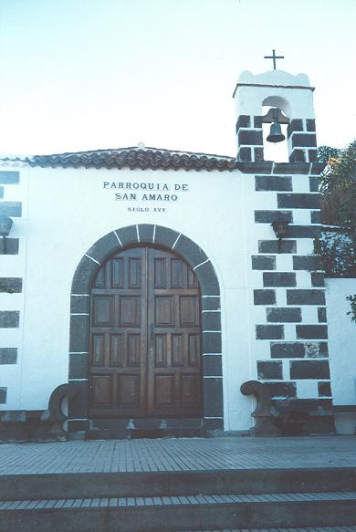 Parroquia de Saint Amaro (San Amaro). Puerto de la Cruz, Tenerife.